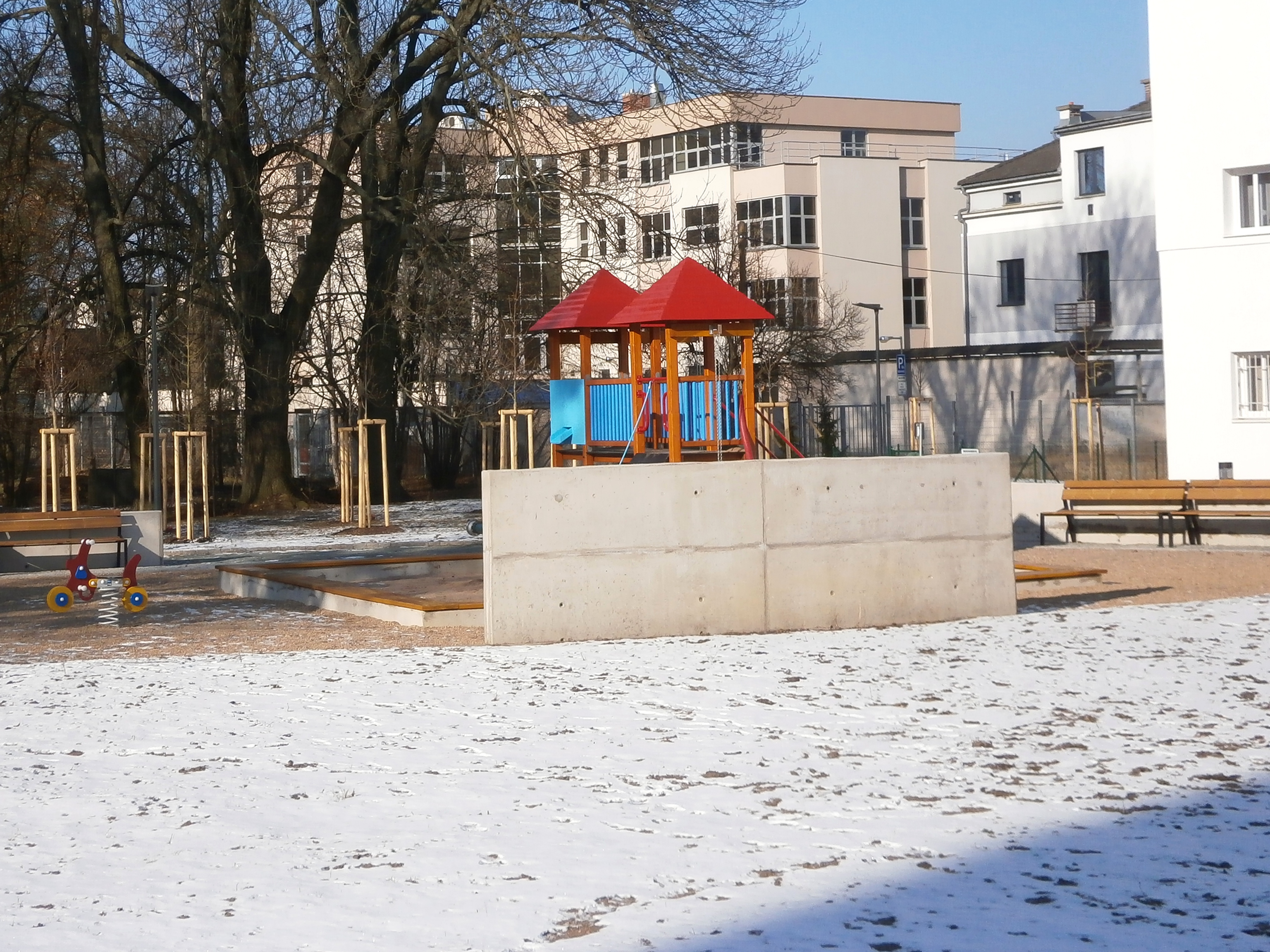 Park Skleněnka v Hradci Králové